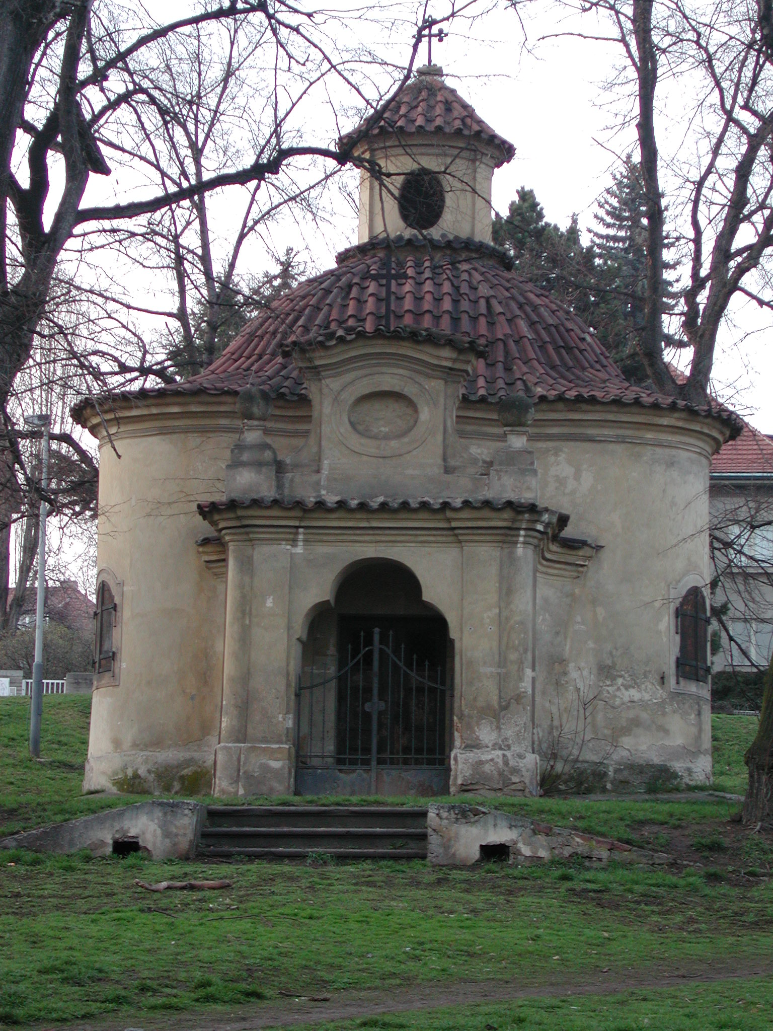 Kaple v ulici Nad Komornickou (v době před rekonstrukcí)